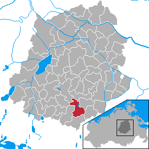 Knorrendorf, Landkreis Demmin, Mecklenburg-Vorpommern